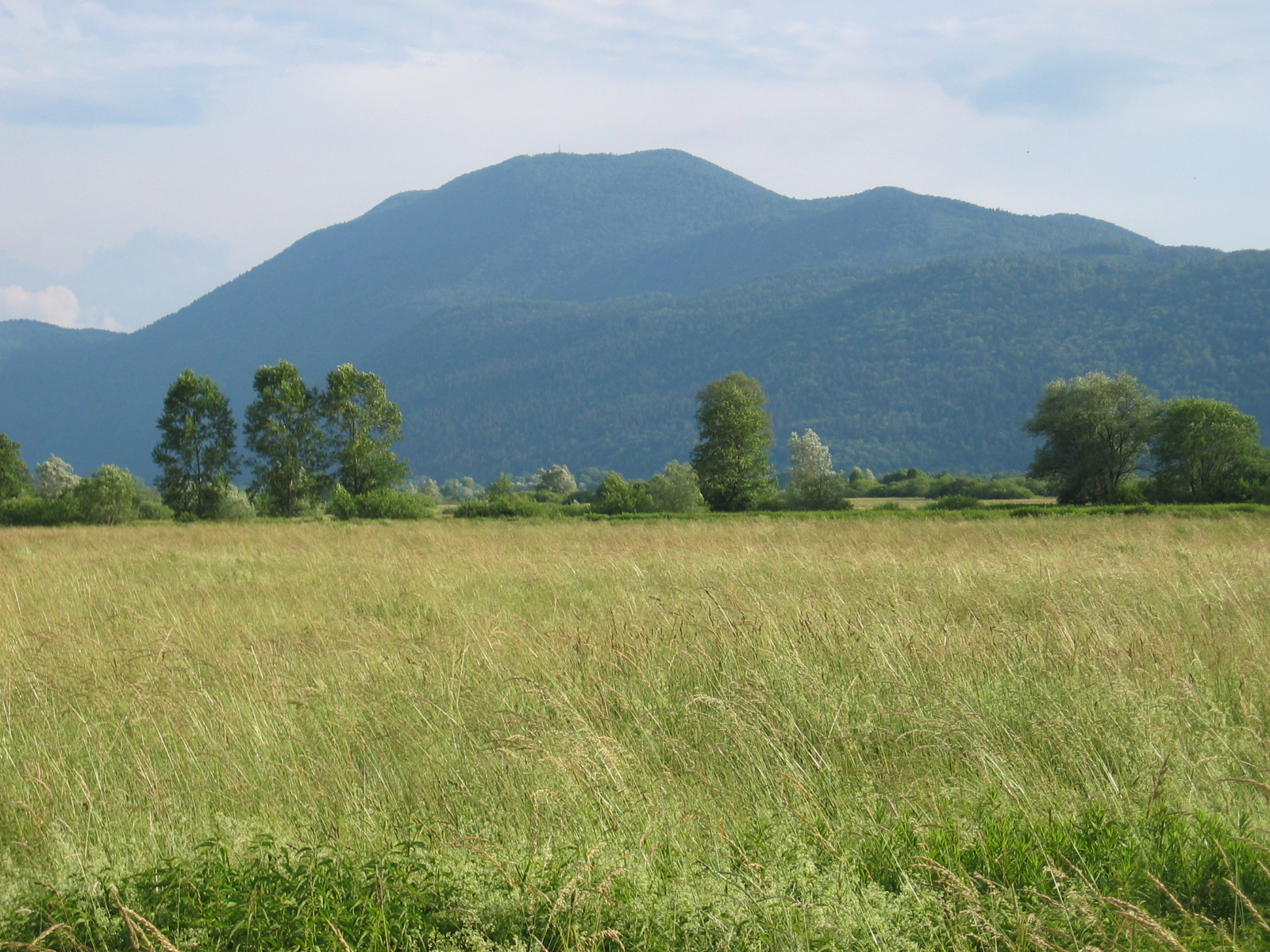 Ljubljansko barje, v ozadju je Krim.